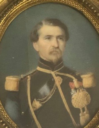 Louis Ferdinand Prudhomme de La Boussinière - Lieutenant-colonel d'artillerie. Photographie personnelle du 13 avril 2020